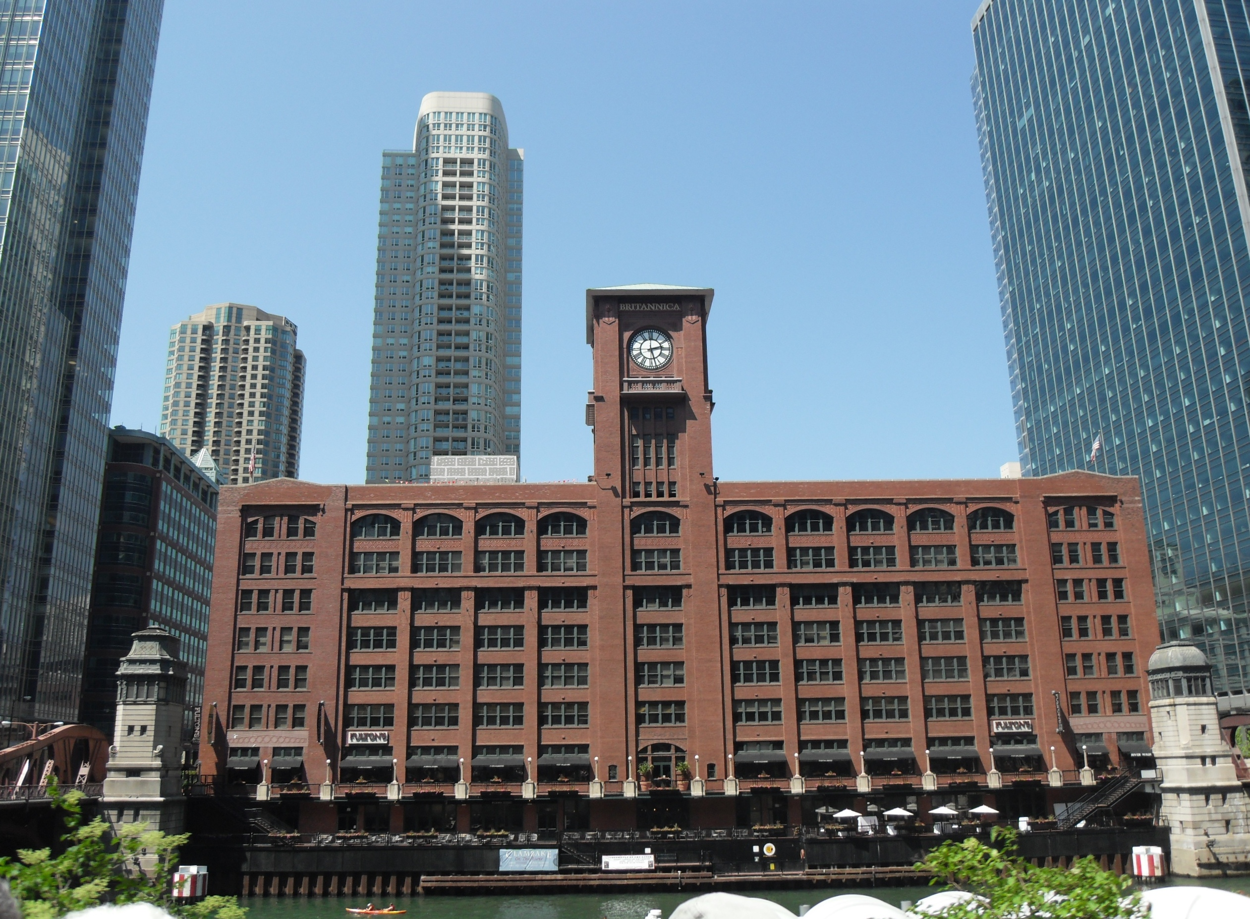 Здание главного офиса энциклопедии "Британника" в Чикаго